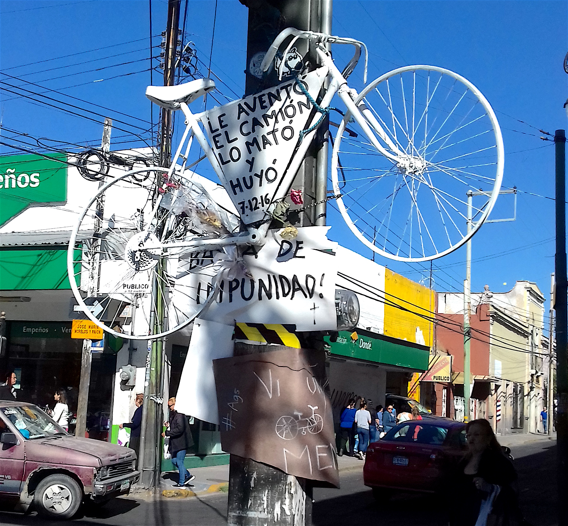 Bicicleta blanca en Aguascalientes, recordando a Guadalupe Rangel, de 70 años, quien murió atropellado por una unidad de transporte público el 7 de diciembre de 2012, en la intersección de las calles Morelos y Rivero y Gutiérrez (junto a El Parián). El letrero tiene la leyenda: “Le aventó el camión, lo mató y huyó”.